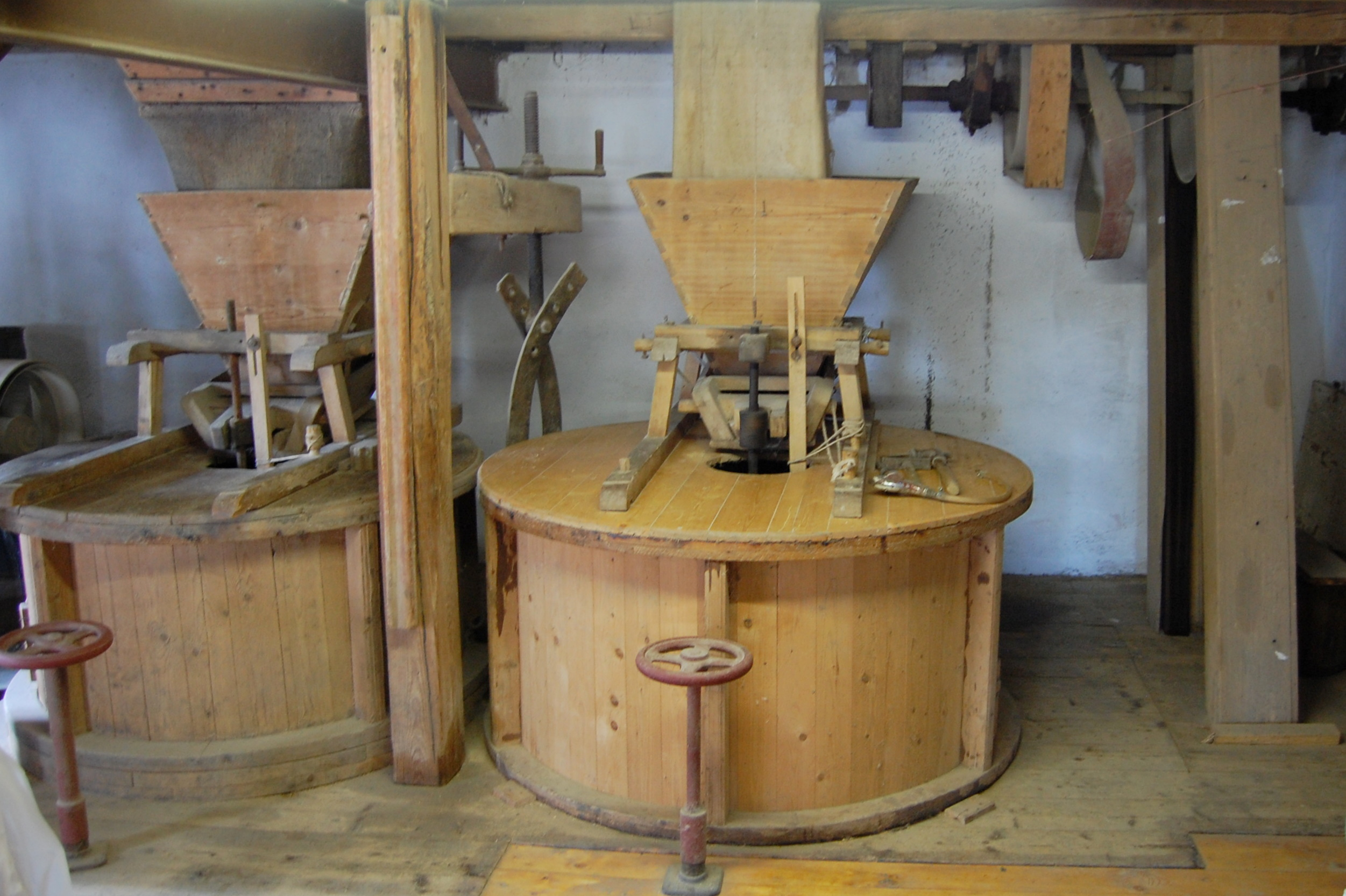 Innenraum Motormühle Groß Börnecke